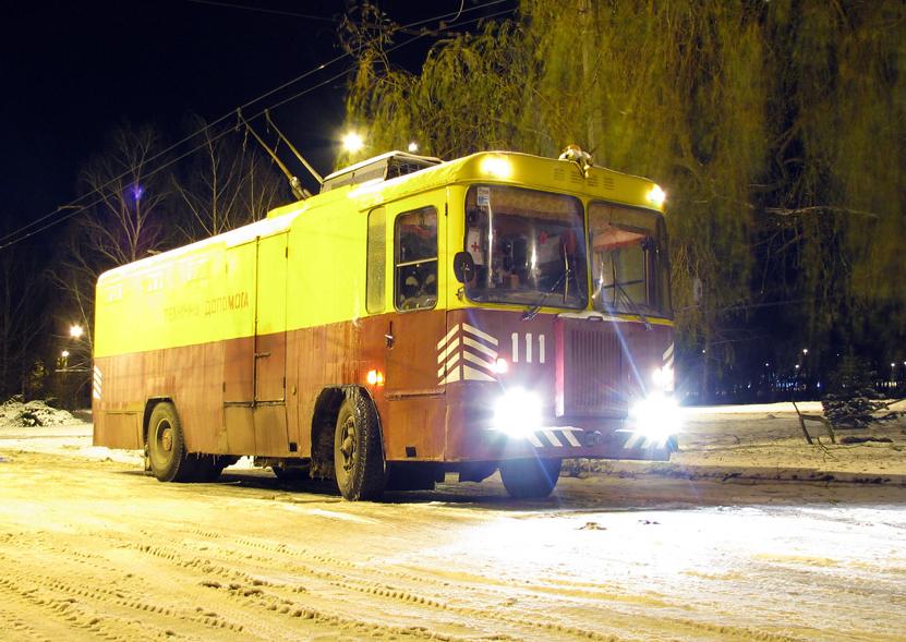 Черниговский троллейбус. Техническая помощь.